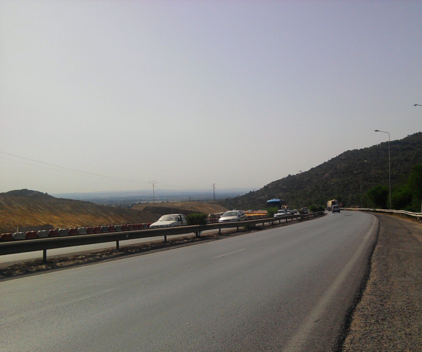 Tunisie, Autoroute A1, col de khanget el hojjaj